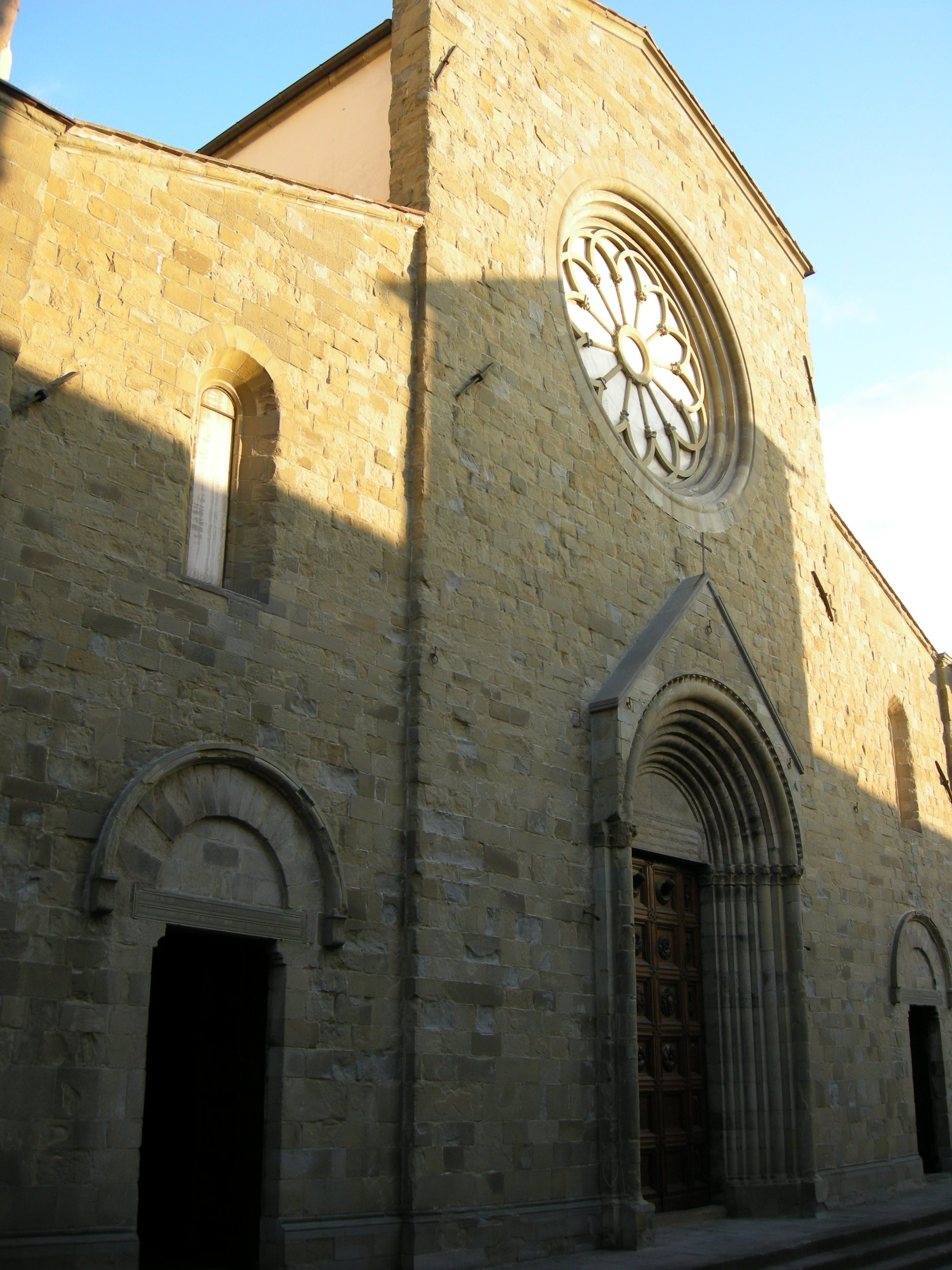 Duomo di sansepolcro, esterno